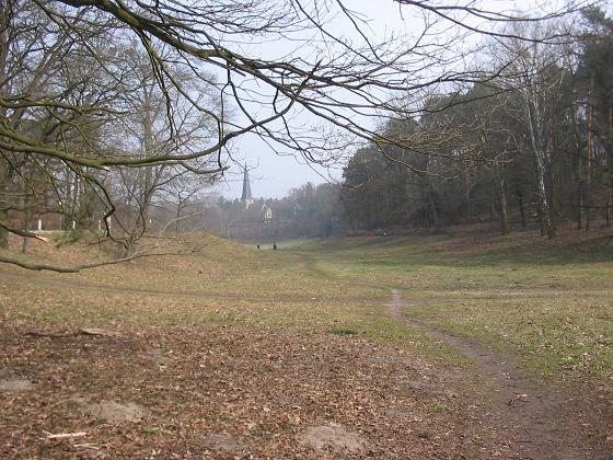 Landschaftsschutzgebiet Rehwiese zwischen Nikolassee und Schlachtensee in Berlin